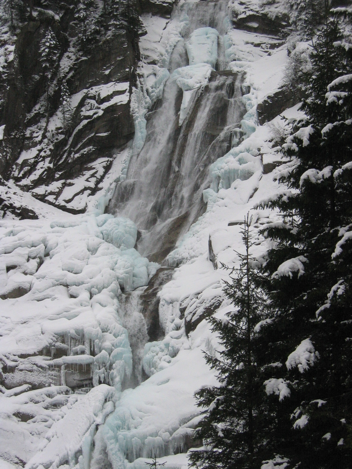 Krimmler Wasserfälle im Winter, selbst fotografiert (1.1.2005), GNU-FDL